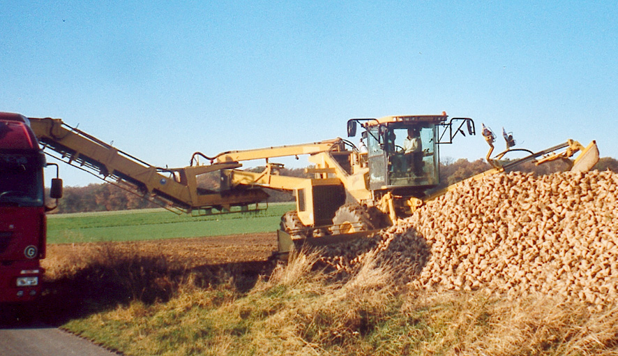 ROPA-Rübenreinigungslader („Rübenlademaus“) bei der Arbeit (Rübenaufnahme und Überladen)